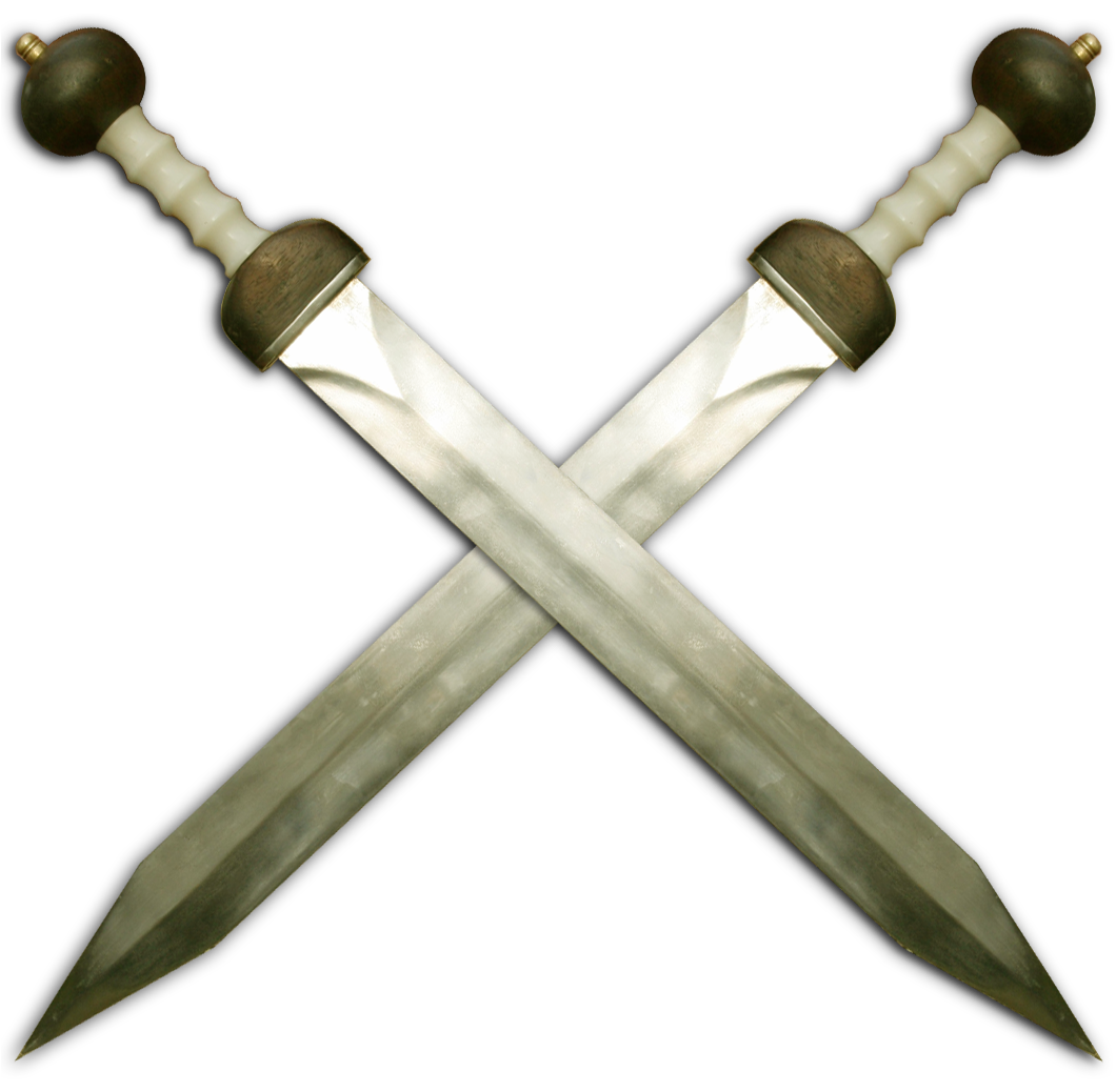 crossed gladii